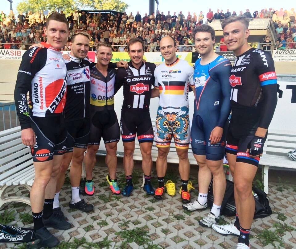 Steherrennen TBK Thüringen Open 2015, Gruppenfoto von Teilnehmern der Veranstaltung, v.l.n.r.: Sascha Damrow, Marcel Barth, René Enders, John Degenkolb, Maximilian Levy, Stefan Bötticher, Marcel Kittel